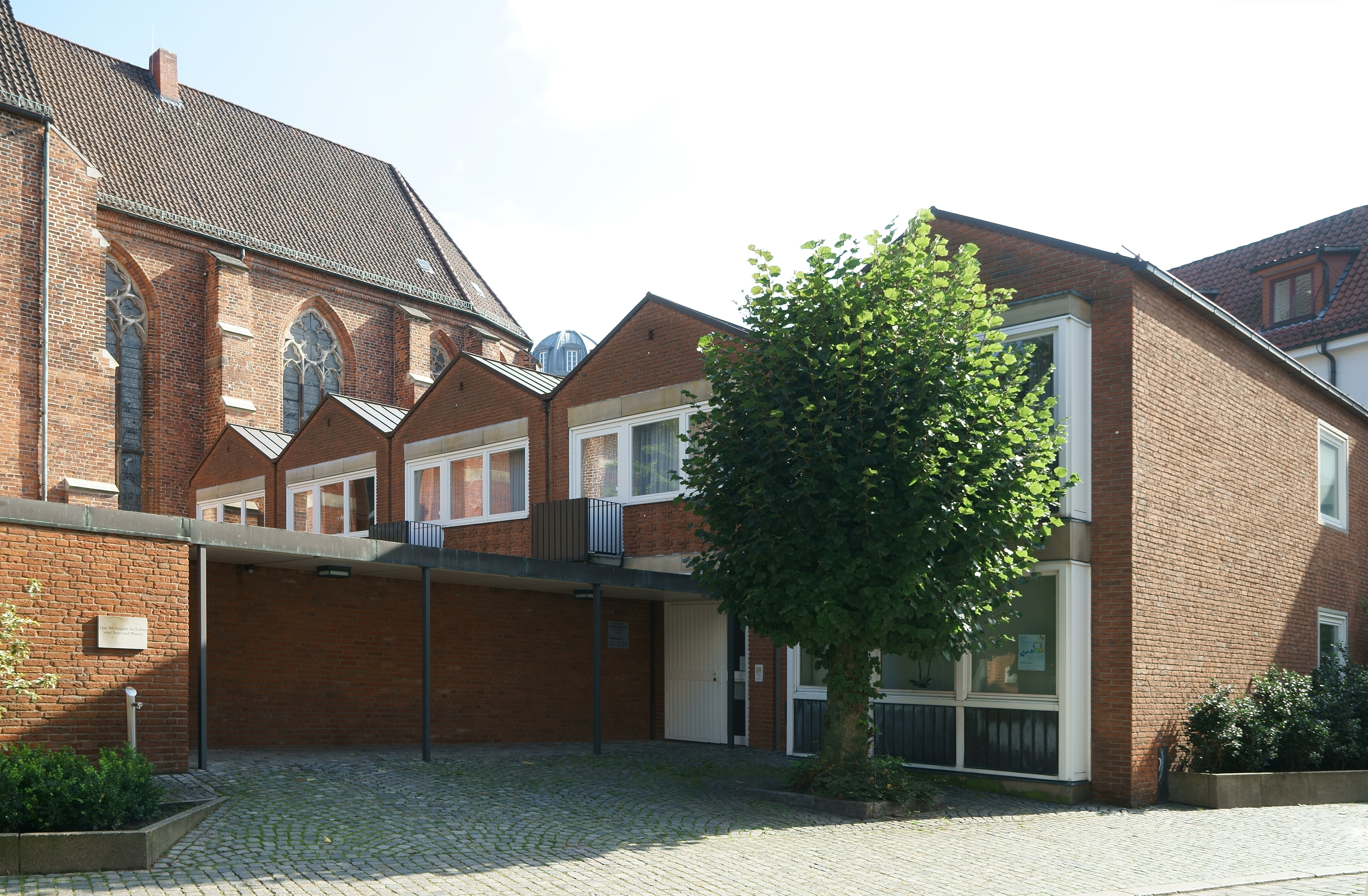 Propstei St. Johannis in Bremen, Hohe Straße 2Das abgebildete Objekt ist ein geschütztes Kulturdenkmal in der Freien Hansestadt Bremen, mit der Nr. 1371 beim Landesamt für Denkmalpflege registriert.